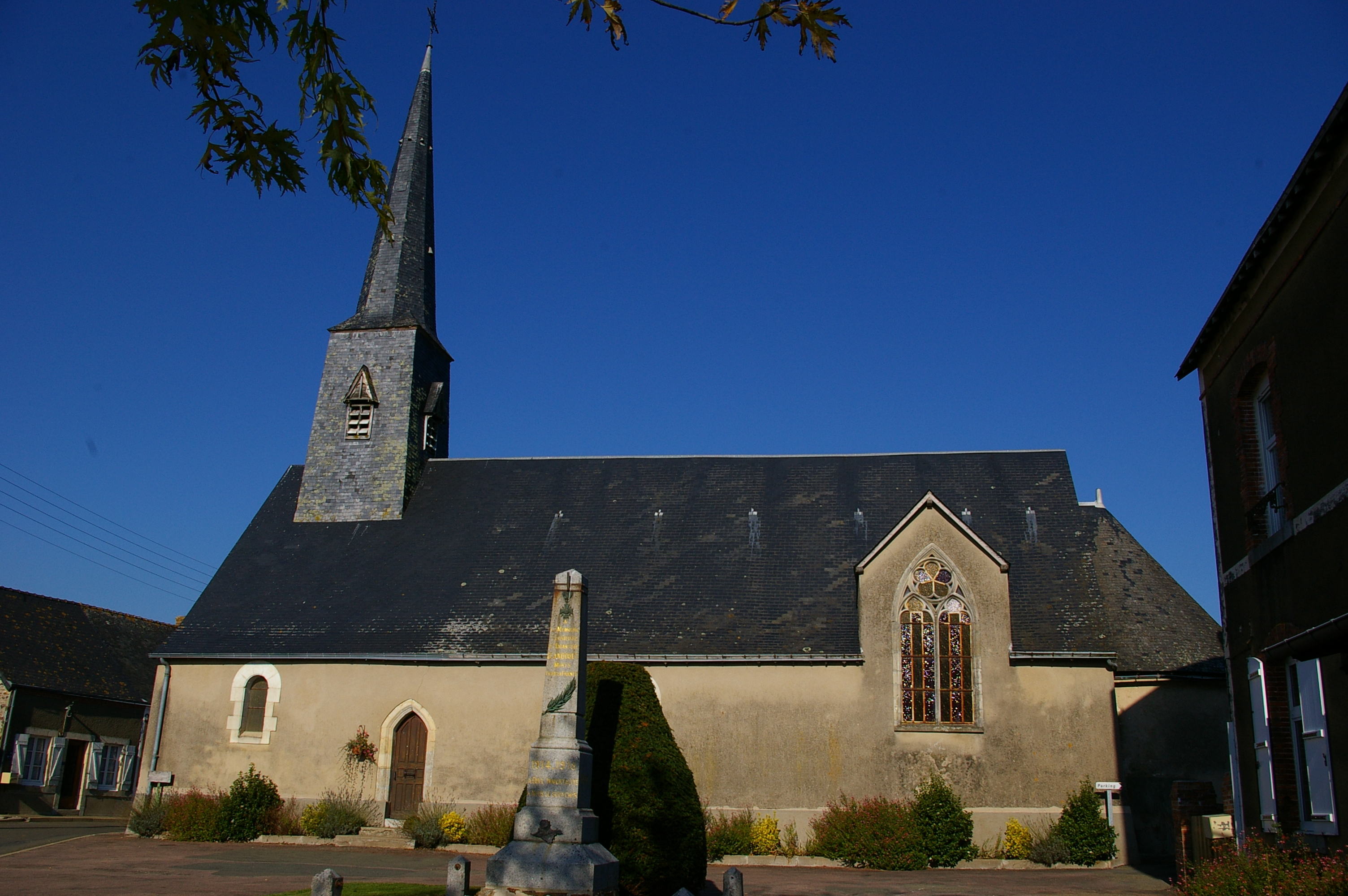 Eglise de Blandouet (Mayenne)